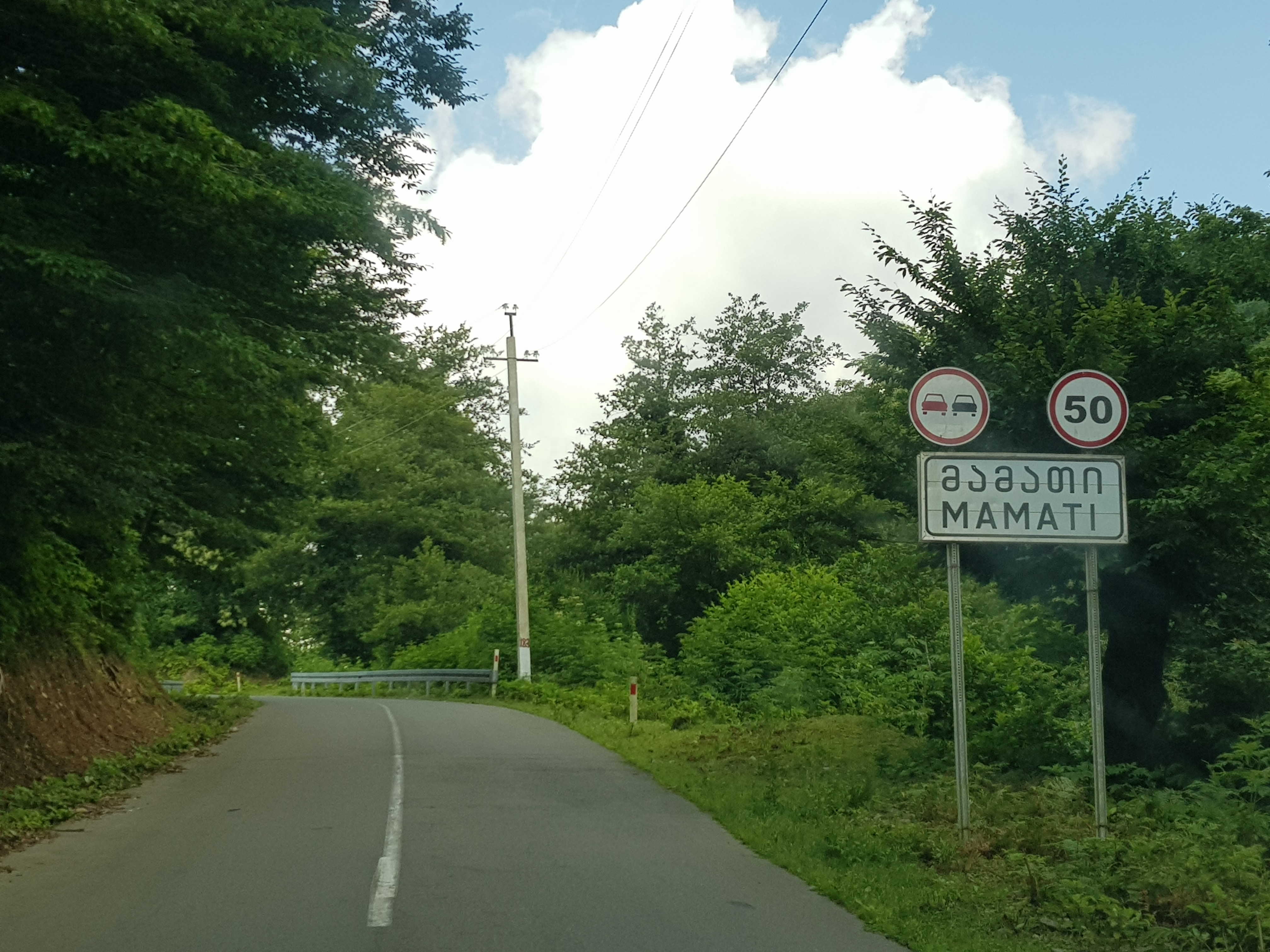 მამათი